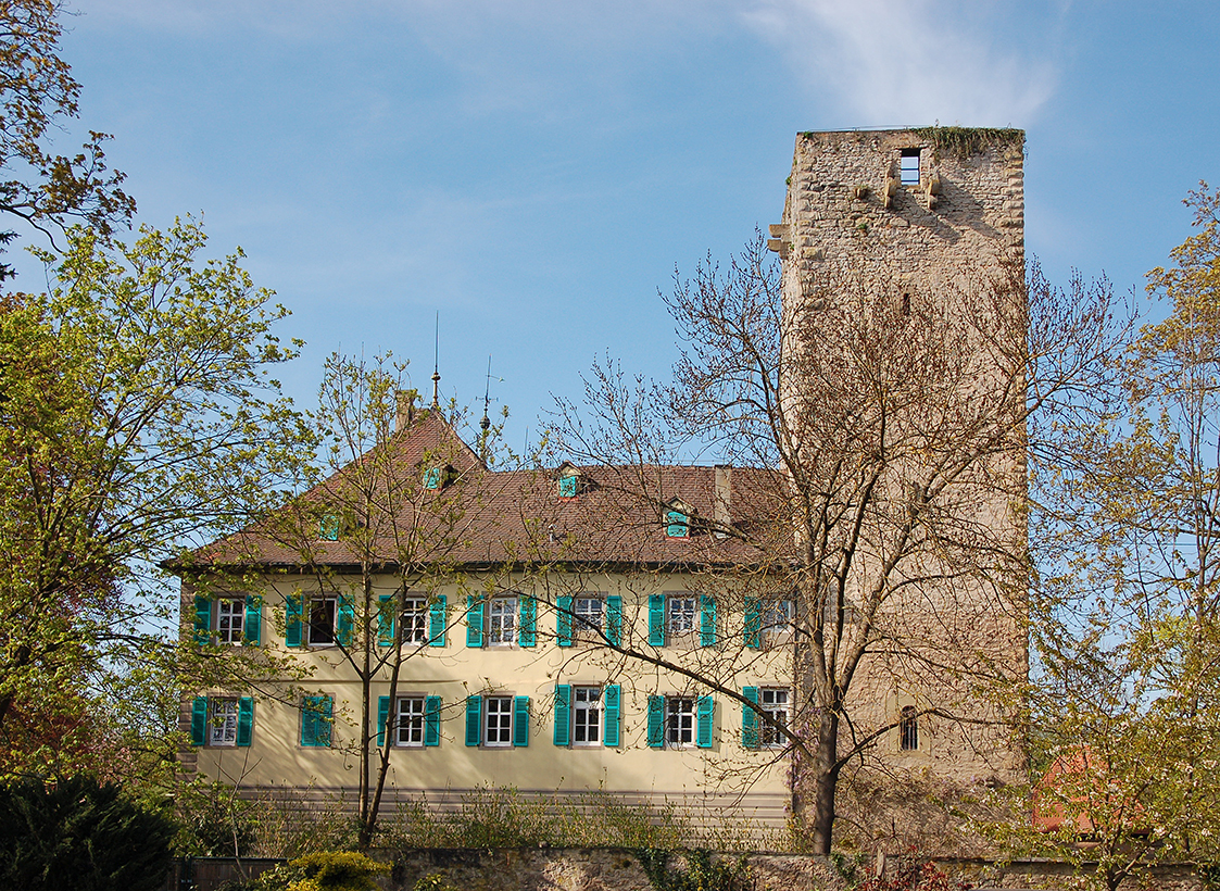 Schloss Unterriexingen (von Süden)